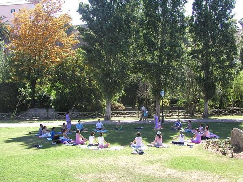 Parque Felício Loureiro, Queluz